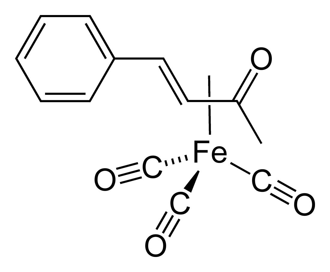 (benzylideneacetone)iron-tricarbonyl-2D-skeletal